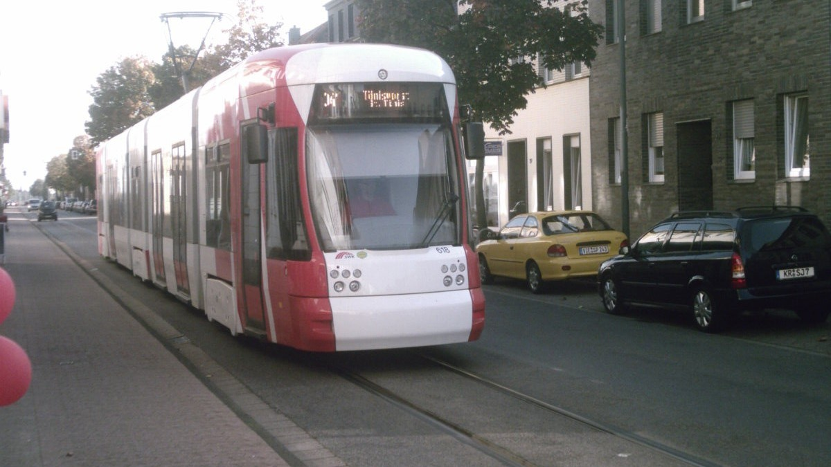 De tram in St.Tönis, Duitsland